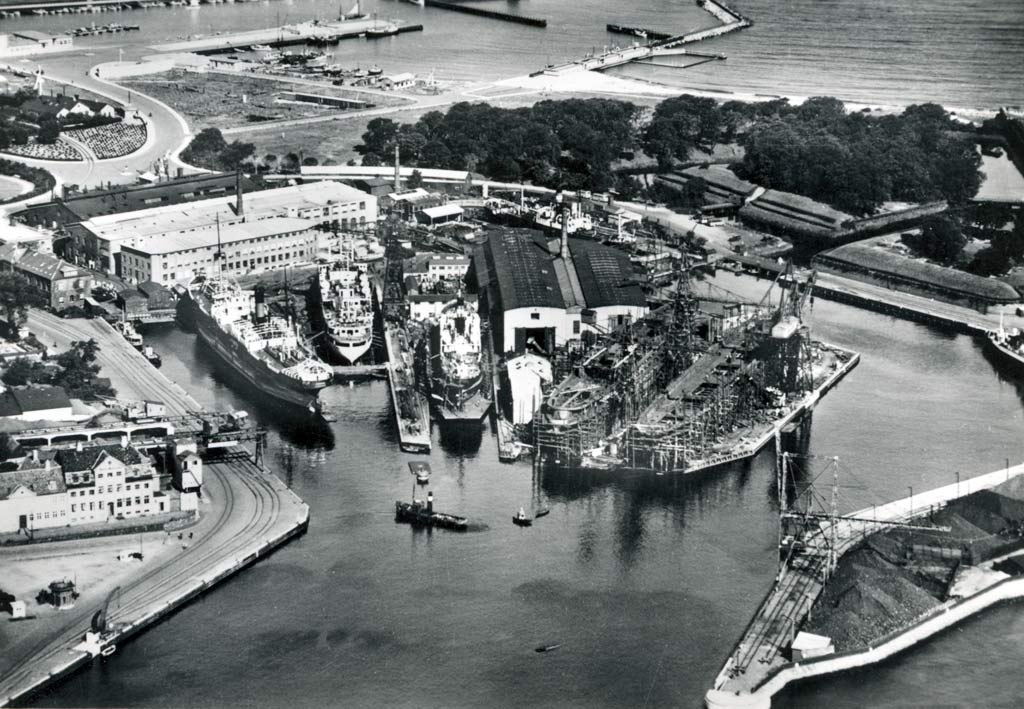 Elsinore Shipyard, 1938. Helsingør Kommunes Museer.